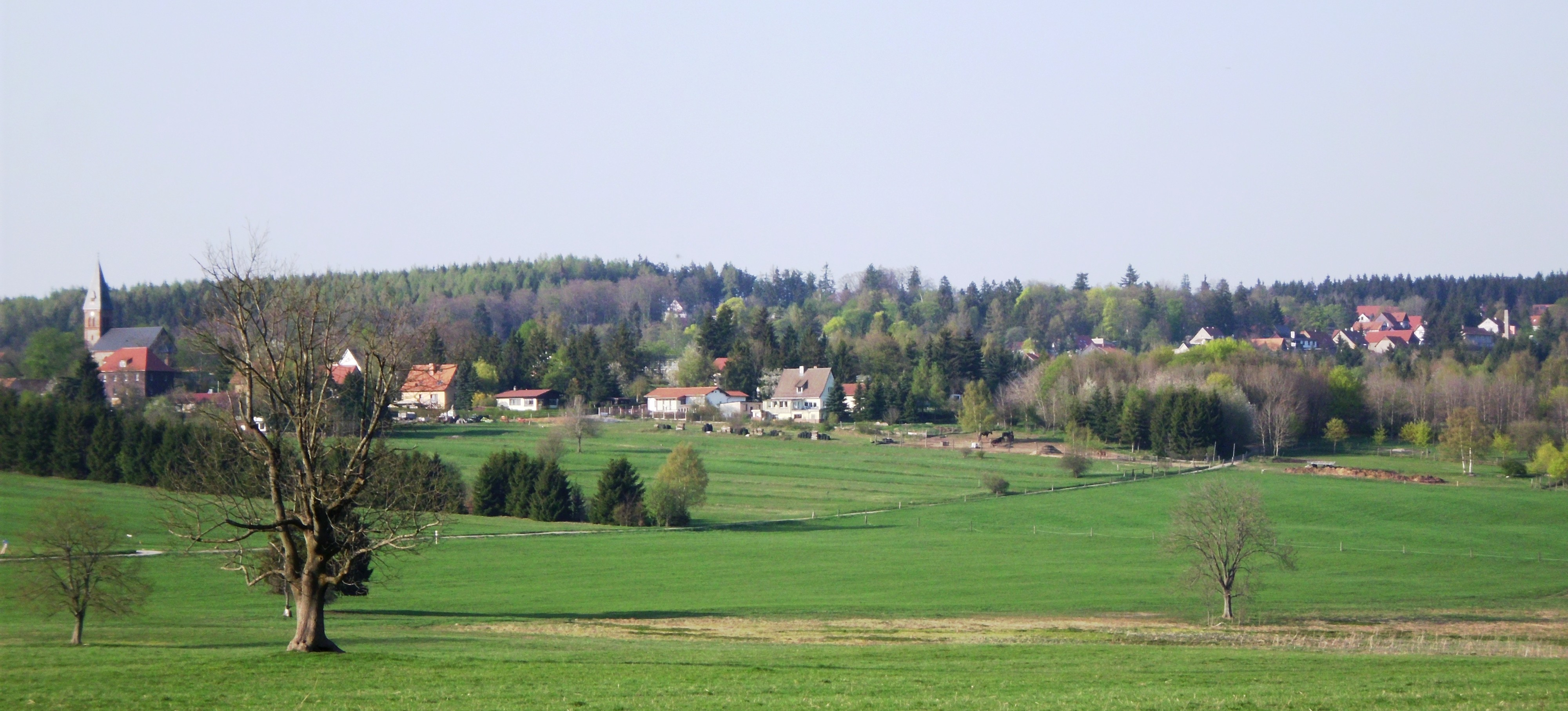 Blick auf Friedrichsbrunn, Stadt Thale